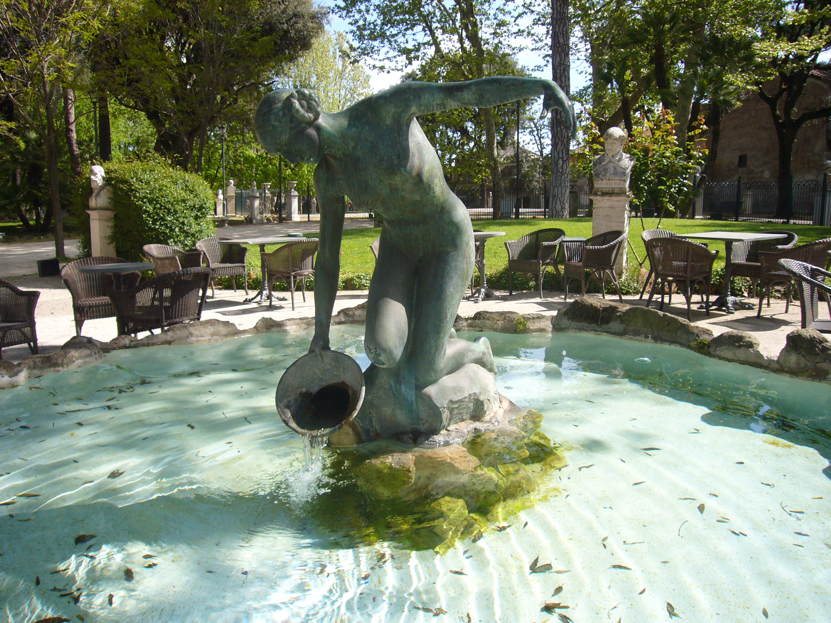 Roma, Pincio, fontana detta "l'Anfora" presso la Casina Valadier (Amleto Cataldi, 1912) - fronte